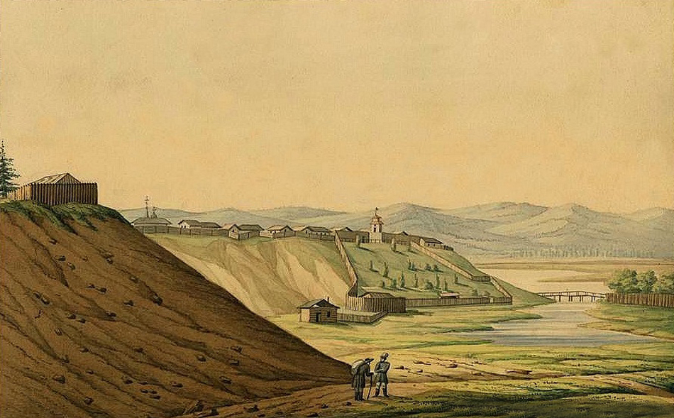 Акварель декабриста-художника Николая Александровича Бестужева.(1791-1855). Период написания - 1827-1830 годы. Место создания - Читинский острог, Забайкальский край